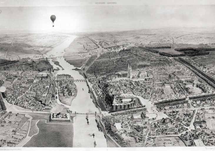 Prise de vue en ballon d’Angers vers 1850